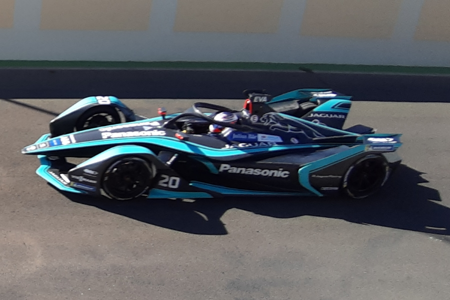 Mitch Evans beim Marrakesch E-Prix 2019